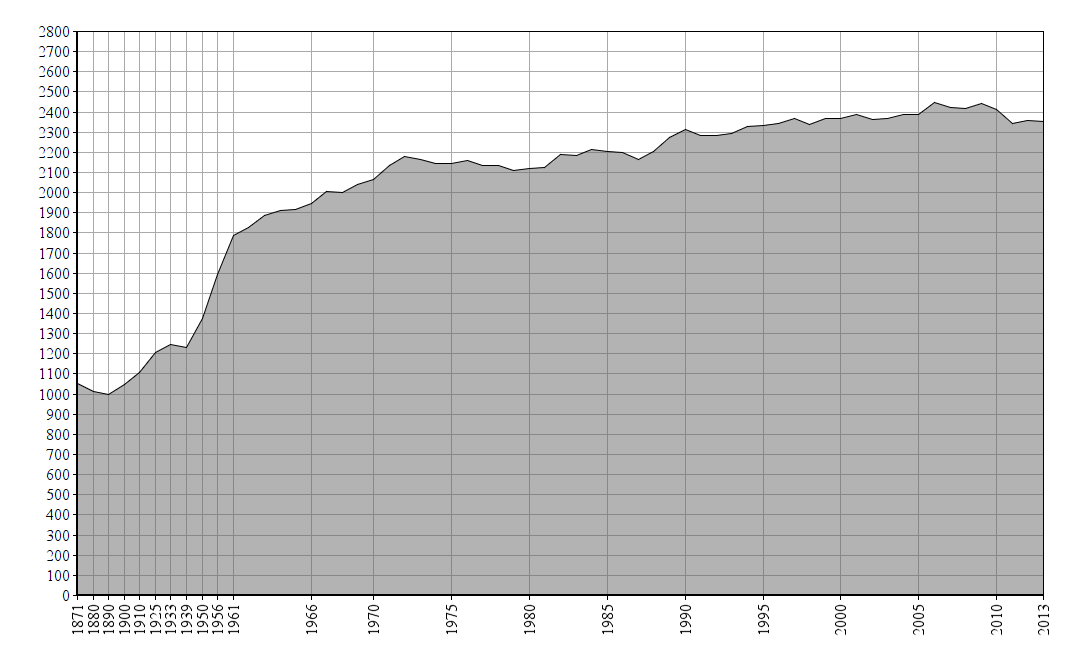 Dieses Bild zeigt die Bevölkerungsstatistik von Berghaupten